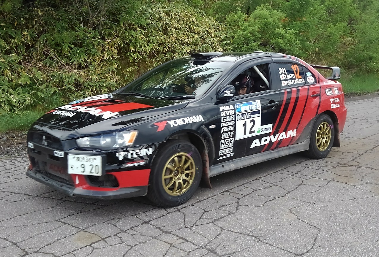 2019年ラリーモントレーにて奴田原文雄がドライブする三菱・ランサーエボリューションⅩ